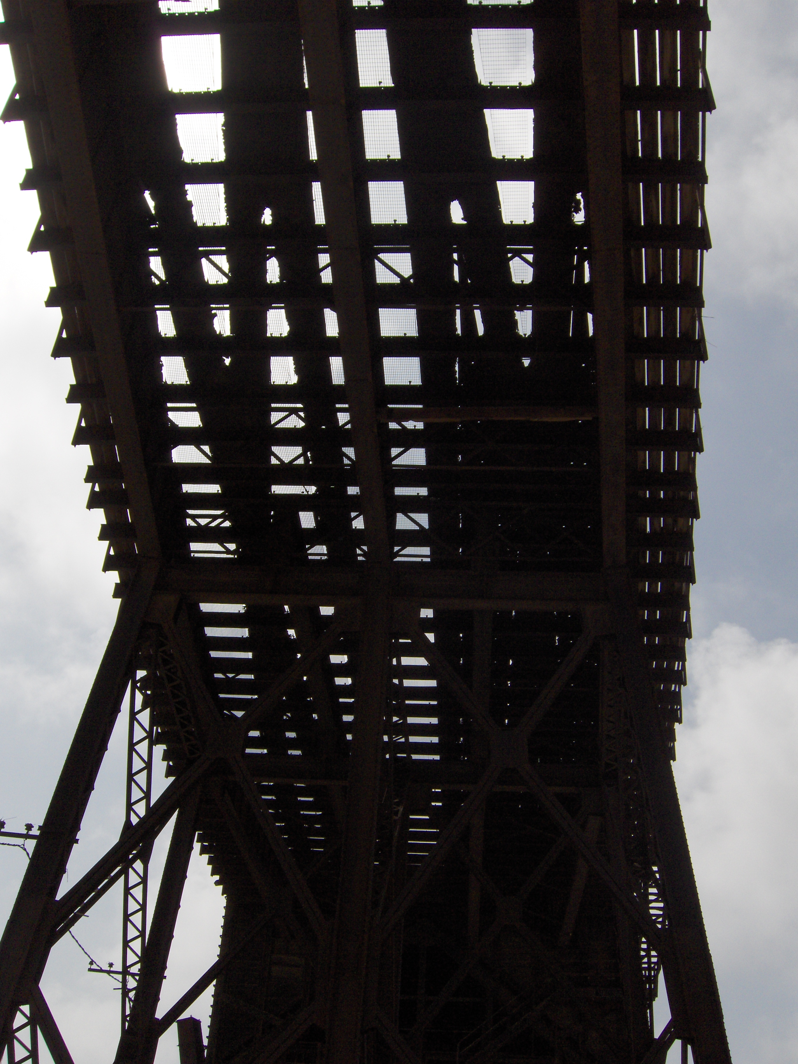 Vista desde abajo de las vías del cargadero del mineral de Almería